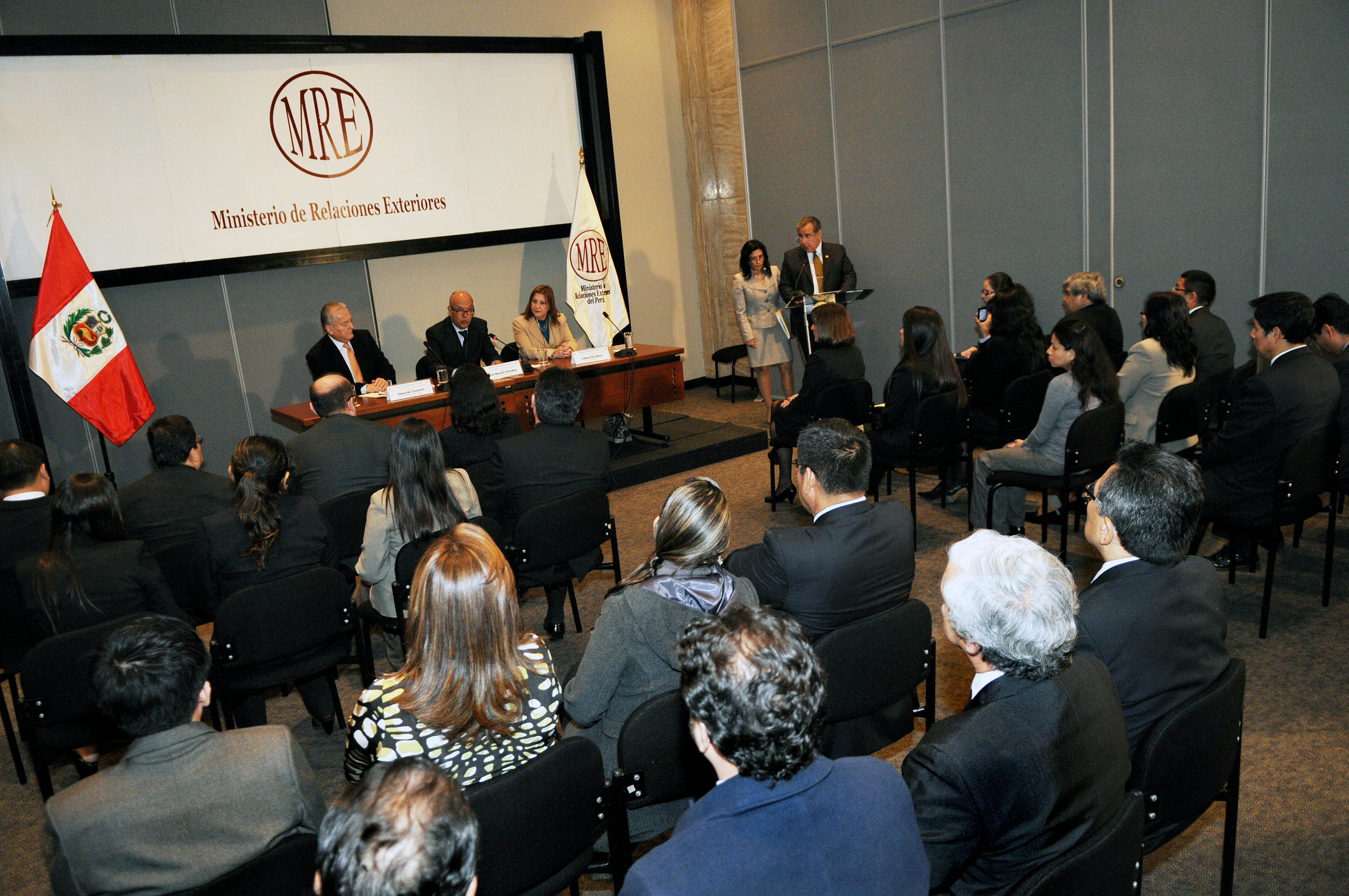 El Vicecanciller José Beraún clausuró el primer “Diplomado en Administración y Finanzas Públicas” que el Ministerio de Relaciones Exteriores ofreció a su personal administrativo y CAS para fortalecer su operatividad en beneficio de todos los peruanos